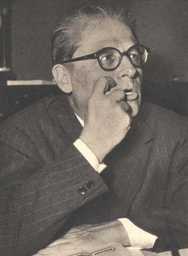 Italian politician Giovanni Gronchi